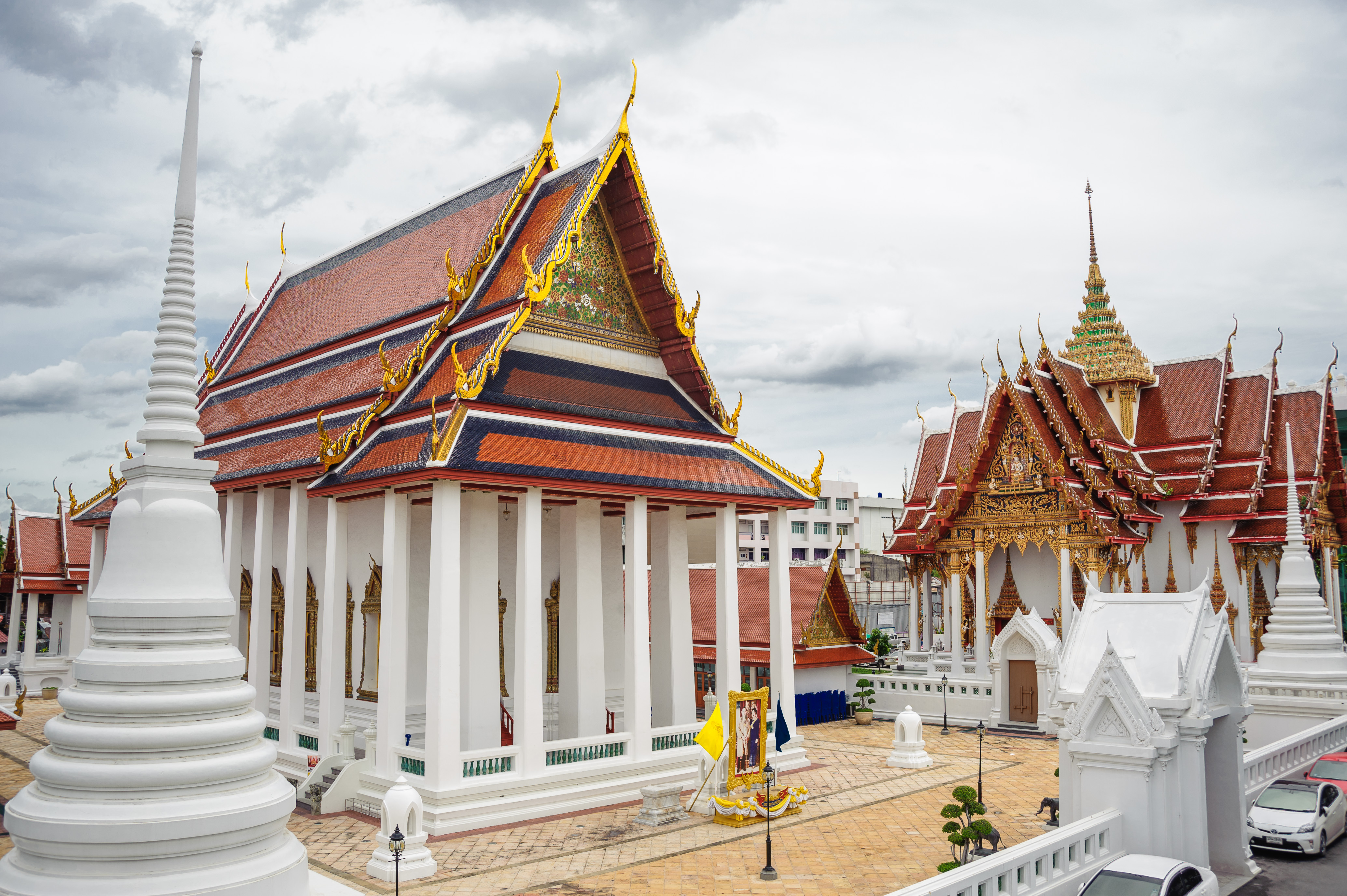 วัดเทวราชกุญชร